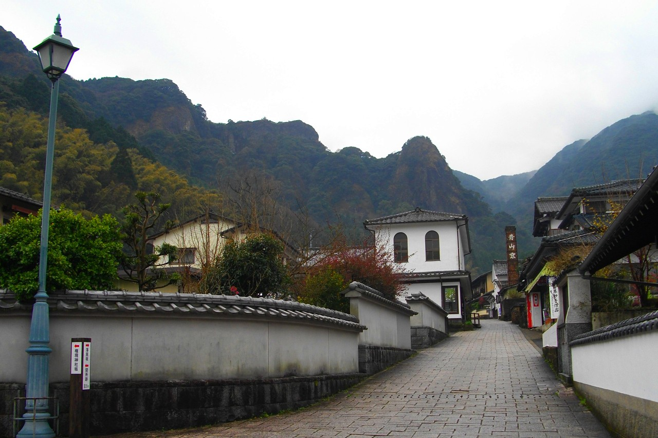 大川内山（佐賀県伊万里市）の町並み。